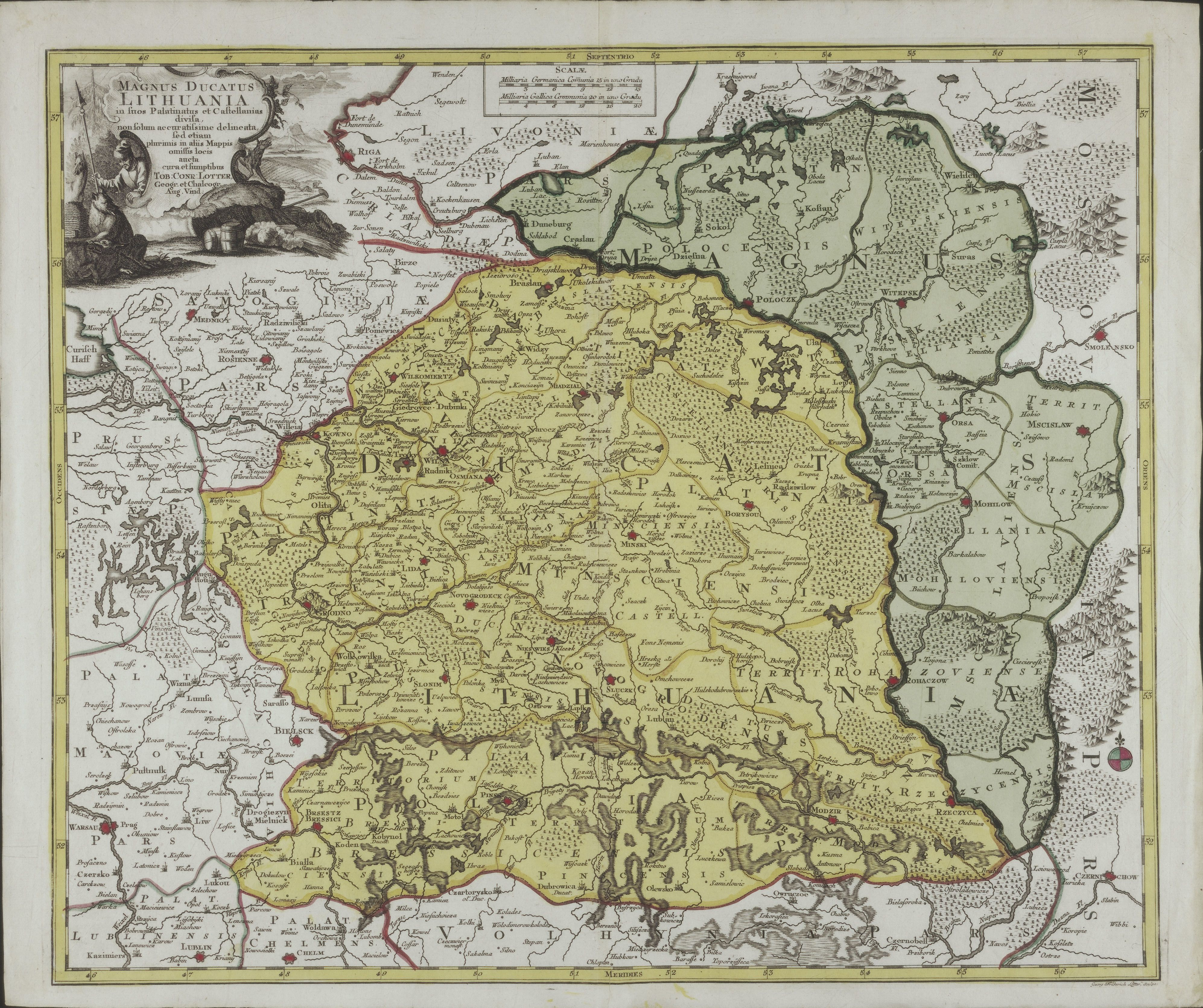 Беларуская (тарашкевіца): Вялікае Княства Літоўскае (Vialikaje Kniastva Litoŭskaje). Мапа